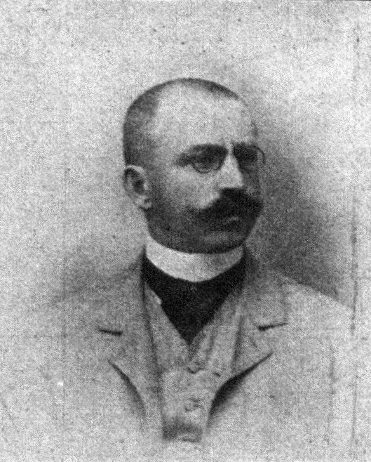 Österreichischer Politiker, Reichsratswahl 1907, Name siehe Dateiname